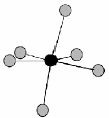 environnement d'un atome d'antimoine dans Y3Au3Sb4